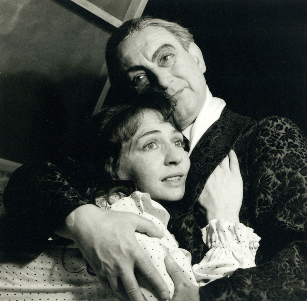 Albert Hackett, Frances Goodrich, Dnevnik Ane Frank, Slovensko gledališče v Trstu. Na fotografiji: Mira Sardoč (Ana), Rado Nakrst (Otto Frank).